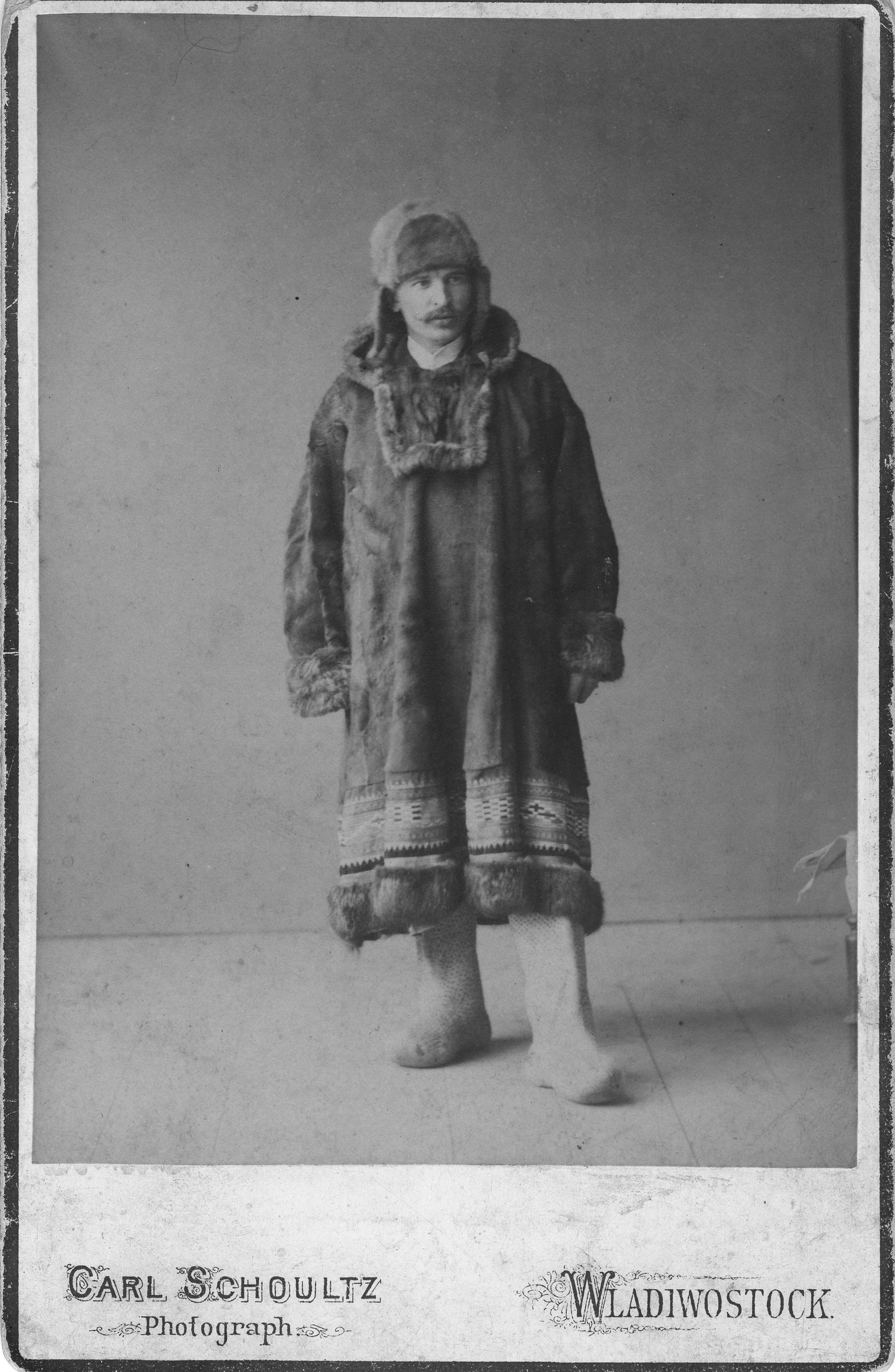 Adolph Dattan (in der Kleidung ostsibirischer Völker: Fischlederstiefel und Kuchljanka)